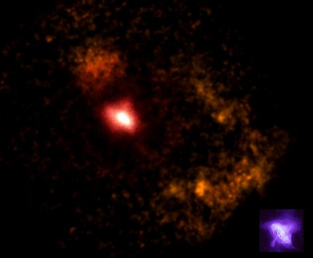 Pulsar Nebula of PSR 0540-69.